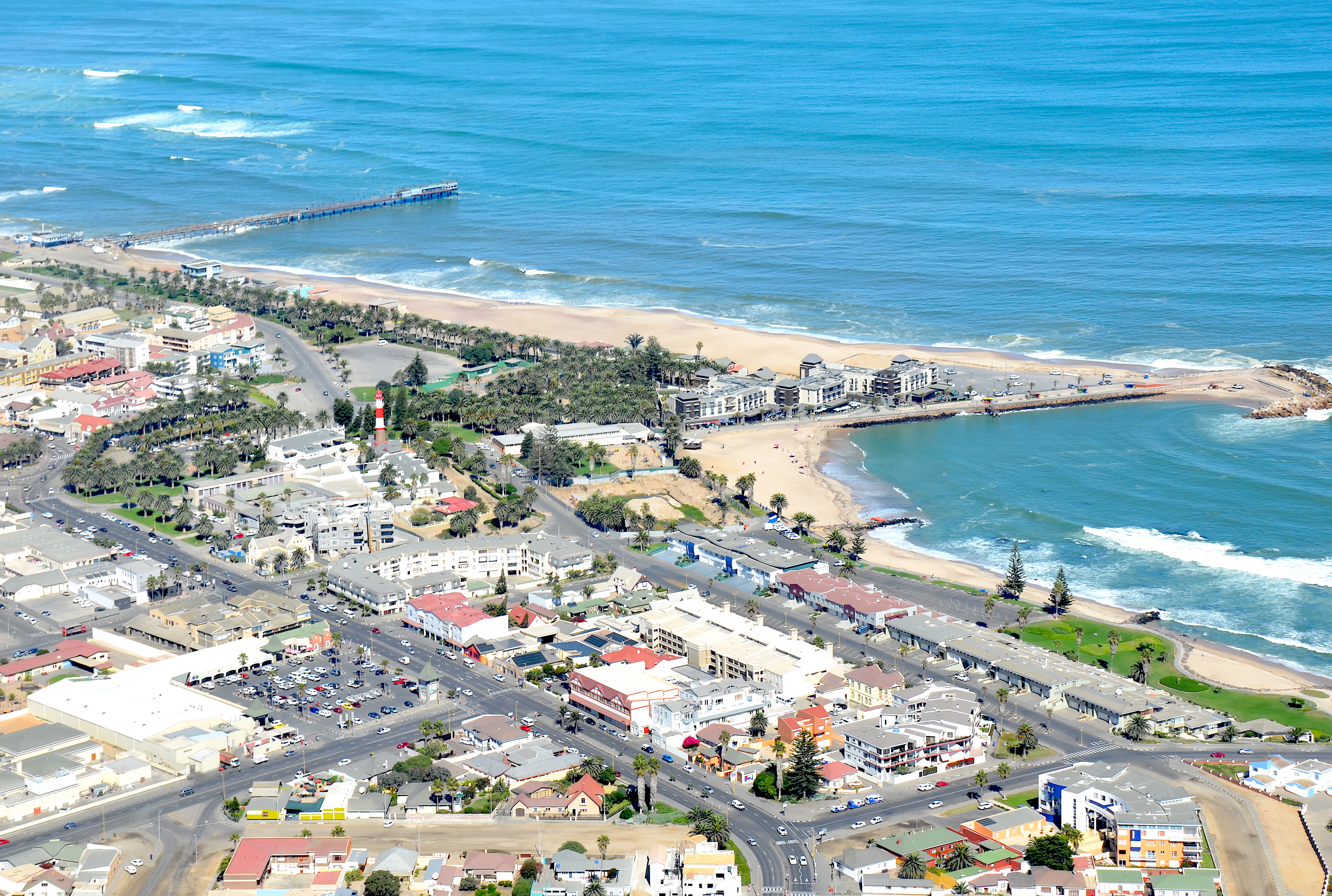 Mole, Jetty und Leuchtturm von Swakopmund in Namibia